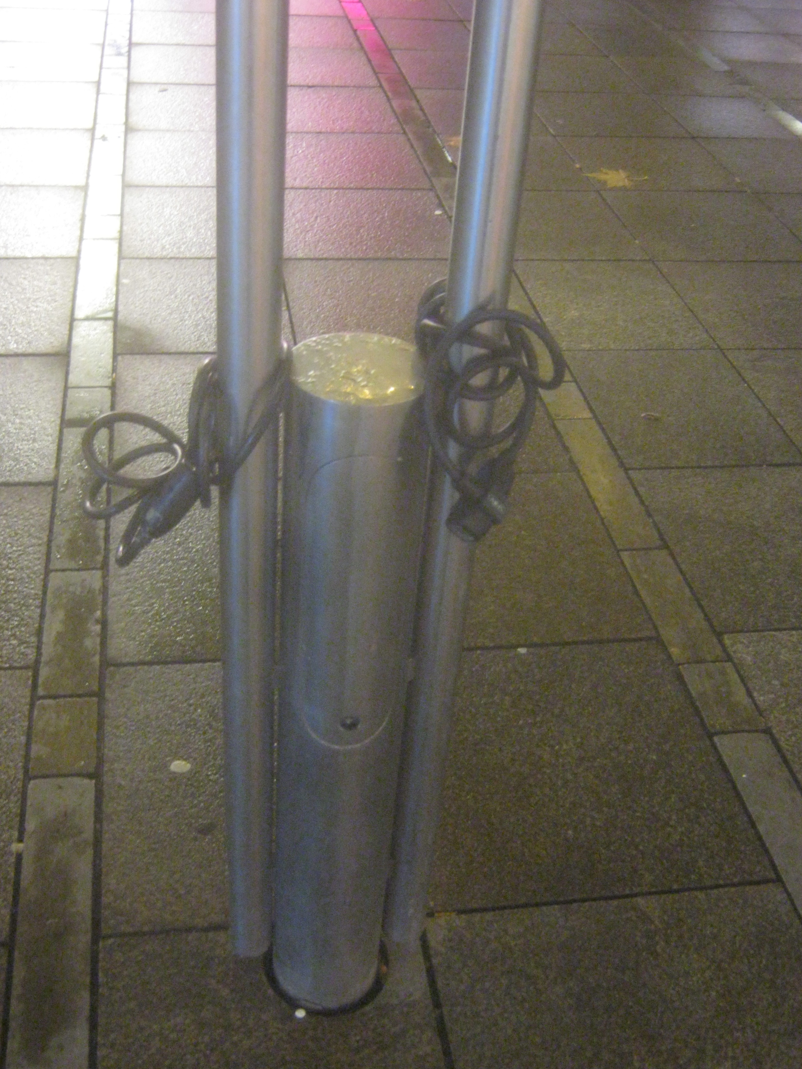 2 vergessene Fahrradschlösser an einer Straßenlampe in der Stuttgarter Königstraße